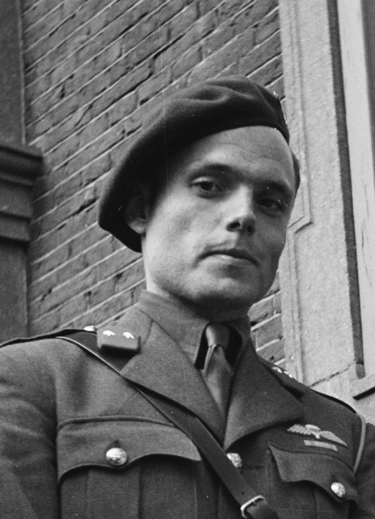 Bezoek van koningin Wilhelmina en prinses Juliana aan Breda in 1945. Adjudanten van koningin Wilhelmina, (vlnr. Peter Tazelaar, Rie Stokvis, Erik Hazelhoff Roelfzema). Collectie: Nationaal Archief / Fotocollectie Anefo Fotograaf: Poll, Willem van de Datum: 02-05-1945 Bestanddeelnummer 900-2749